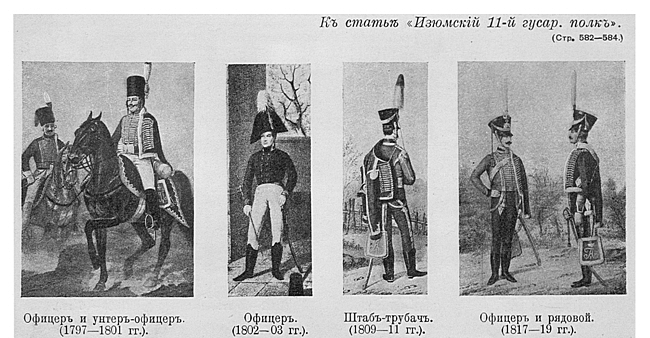 Это изображение было использовано для иллюстрирования статьи «Изюмский, 11-й гусарский, генерала Дорохова, ныне Его Королевского Высочества Принца Генриха Прусского, полк» опубликованной в десятом томе «Военной энциклопедии», который был издан книгоиздательским товариществом И. Д. Сытина в 1912—1913 гг. в столице Российской империи городе Санкт-Петербурге.